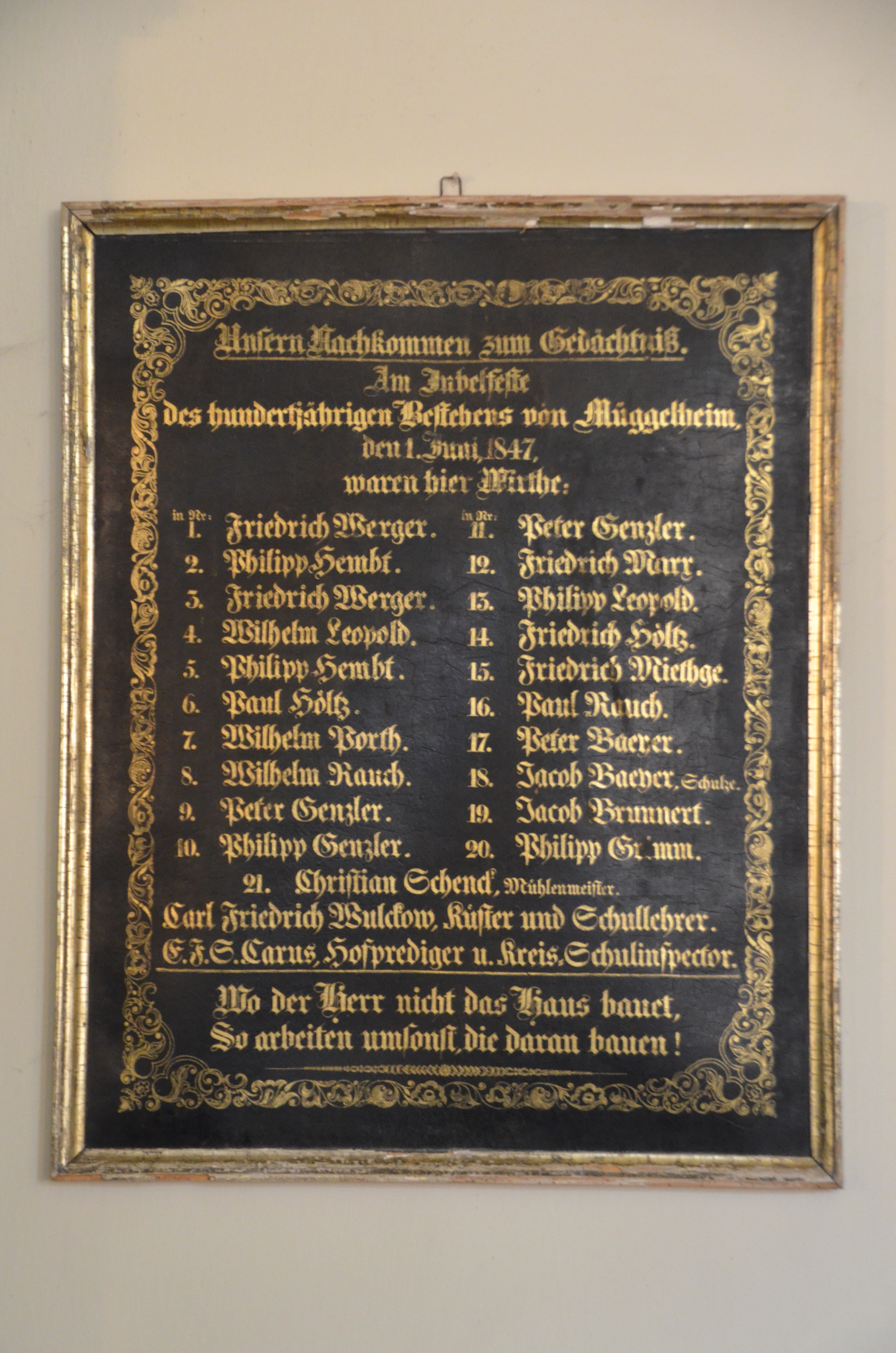 Dorfkirche Müggelheim: Gedenktafel